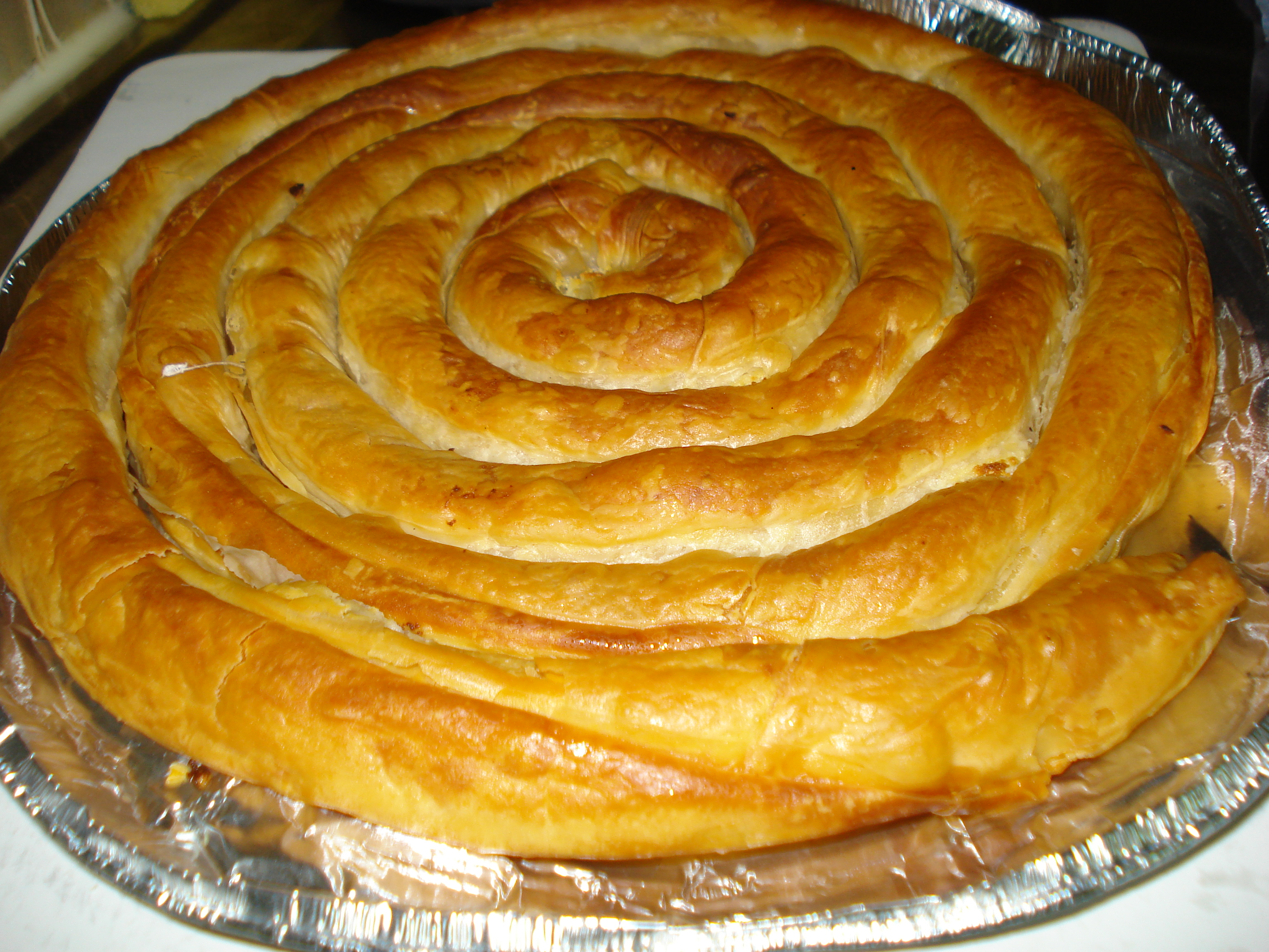 Striftí Tirópita (στριφτή τυρόπιτα, lit. tirópita enrotllat), típic de Kozani.